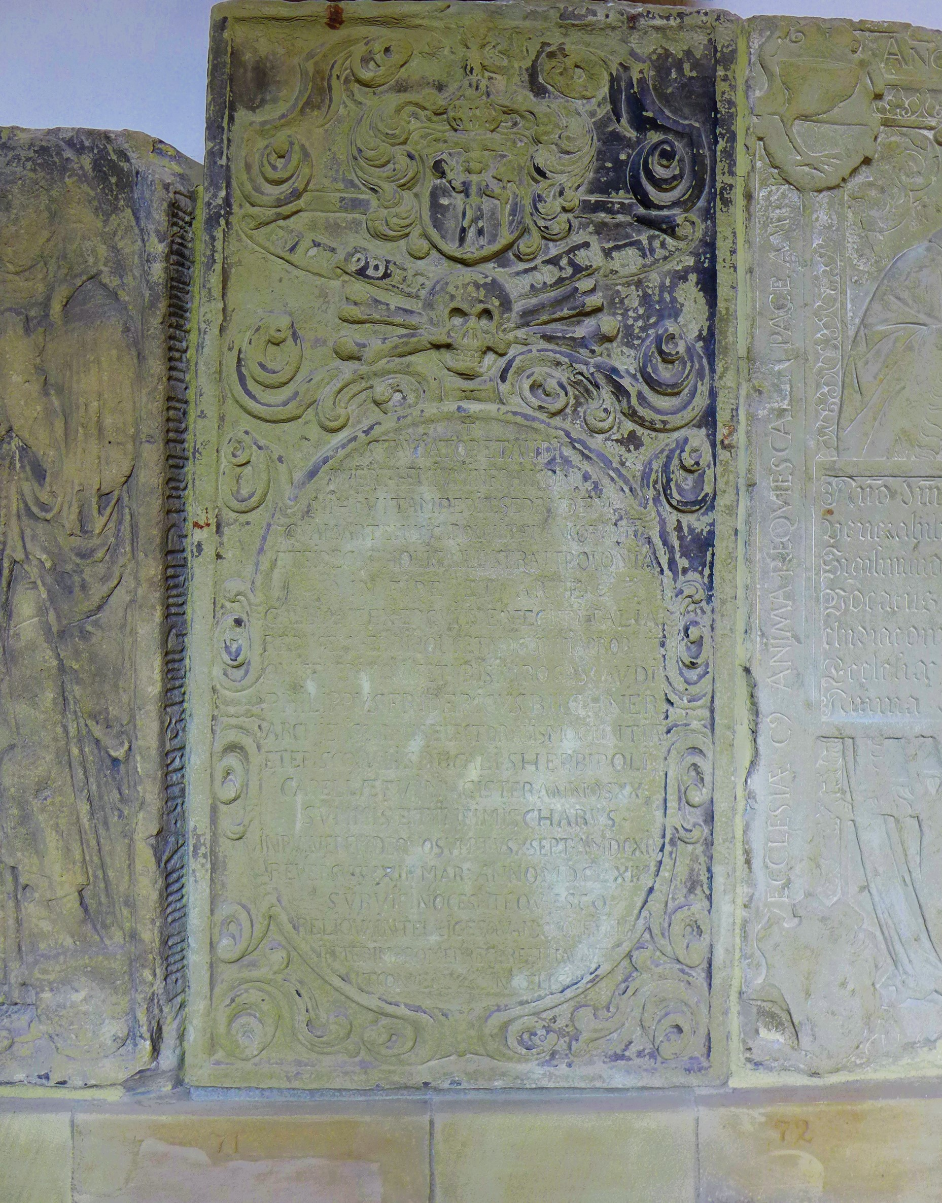 Domkreuzgang Würzburg, Grabplatte von Philipp Friedrich Buchner, Erzbischöflich-kurfürstlich Mainzer und fürstbischöflich Würzburger Kapellmeister (10. September 1614 in Wertheim - 23. März 1669 in Würzburg)